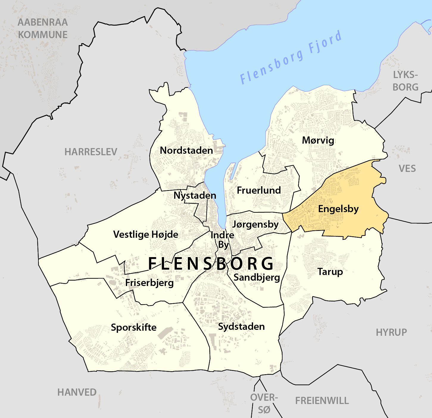 Beliggendhed af Engelsby i Flensborg Kommune